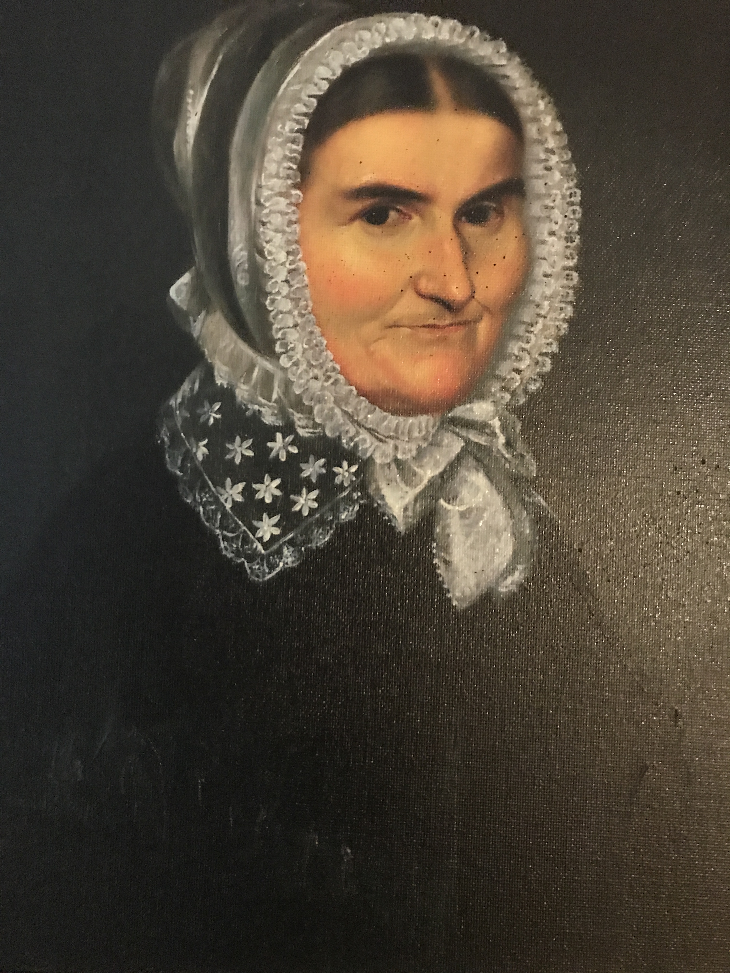 Katharina Aurelie Amalie Jung geb. Becker (1782–1850), Ehefrau von Johann Jakob Jung.